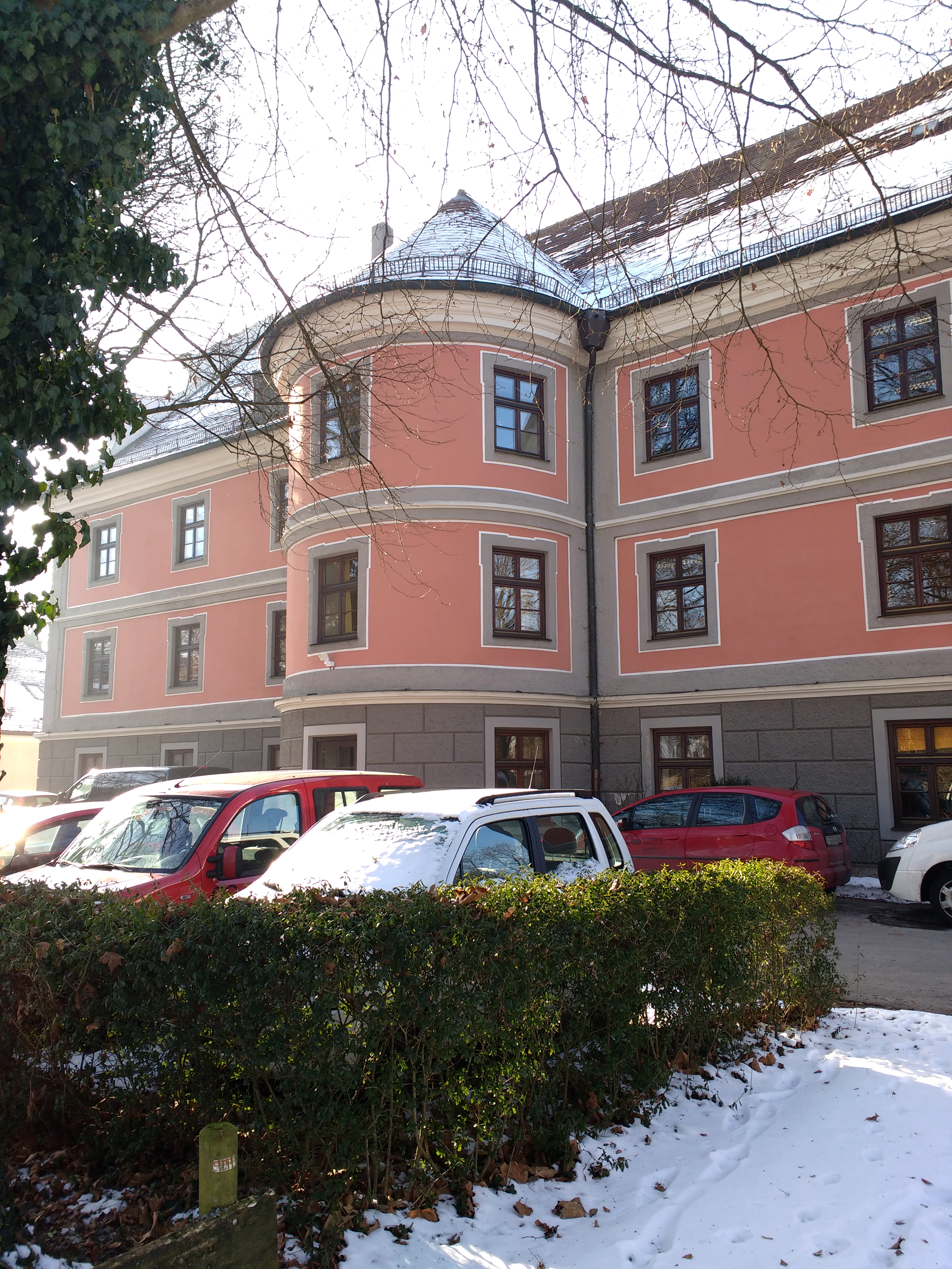 Eckherhaus in Freising. Denkmalgeschütztes ehemaliges Krankenhaus. Später Lazarett und heute Musikschule